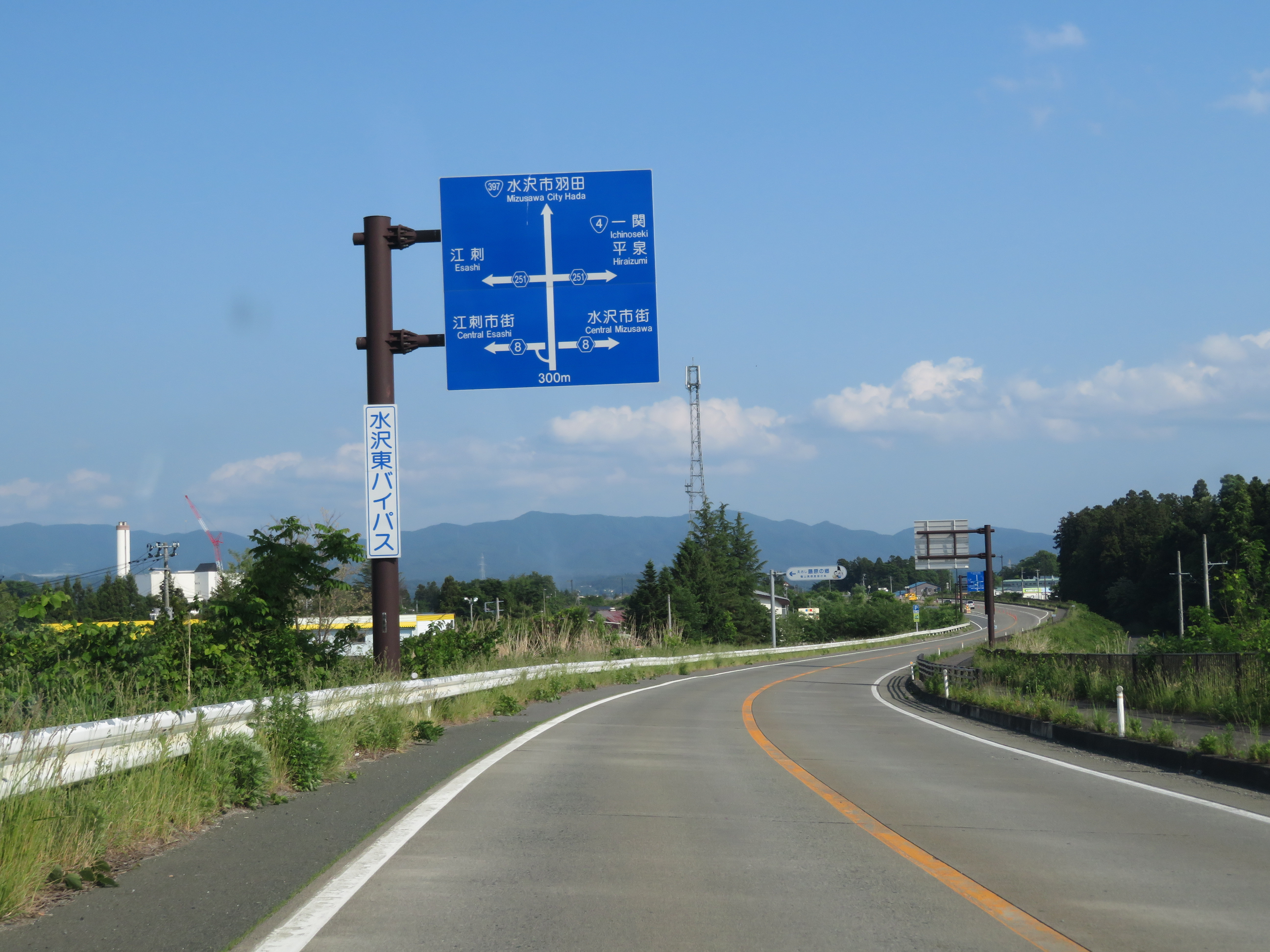 国道4号線水沢東バイパス 奥州市水沢区佐倉河白井坂付近（北上方面側から撮影） Canon PowerShot SX720 HS